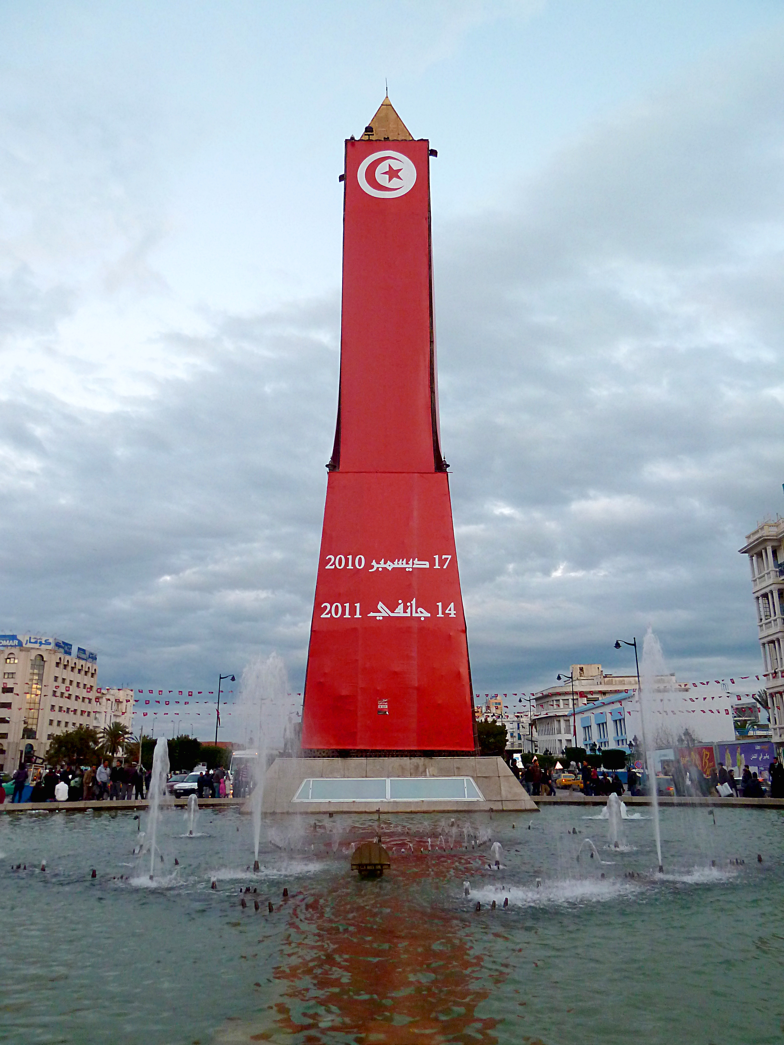 La place du 14 janvier 2011 à Tunis le jour de commémoration de la révolution tunisienne 2 ans après.